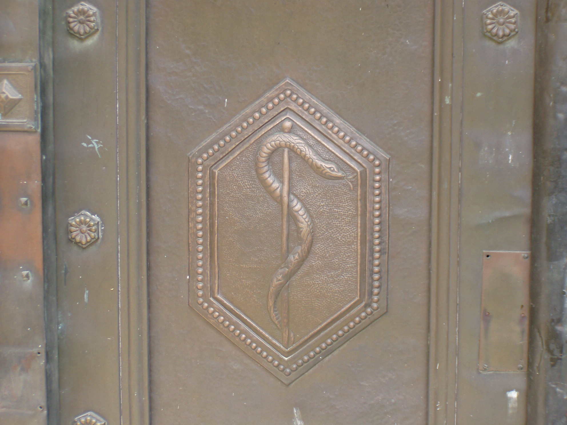 בית הבריאות שטראוס, או בשמו המלא החרוט מעל כניסתו "בית הבריאות על שם נתן ולינה שטראוס לבני כל הגזעים והדתות", הוא מבנה ששיכן מרפאות ברחוב שטראוס בירושלים. נחנך על ידי ההסתדרות הציונית הדסה, ביוזמת הנרייטה סולד ובתרומתו של נתן שטראוס.